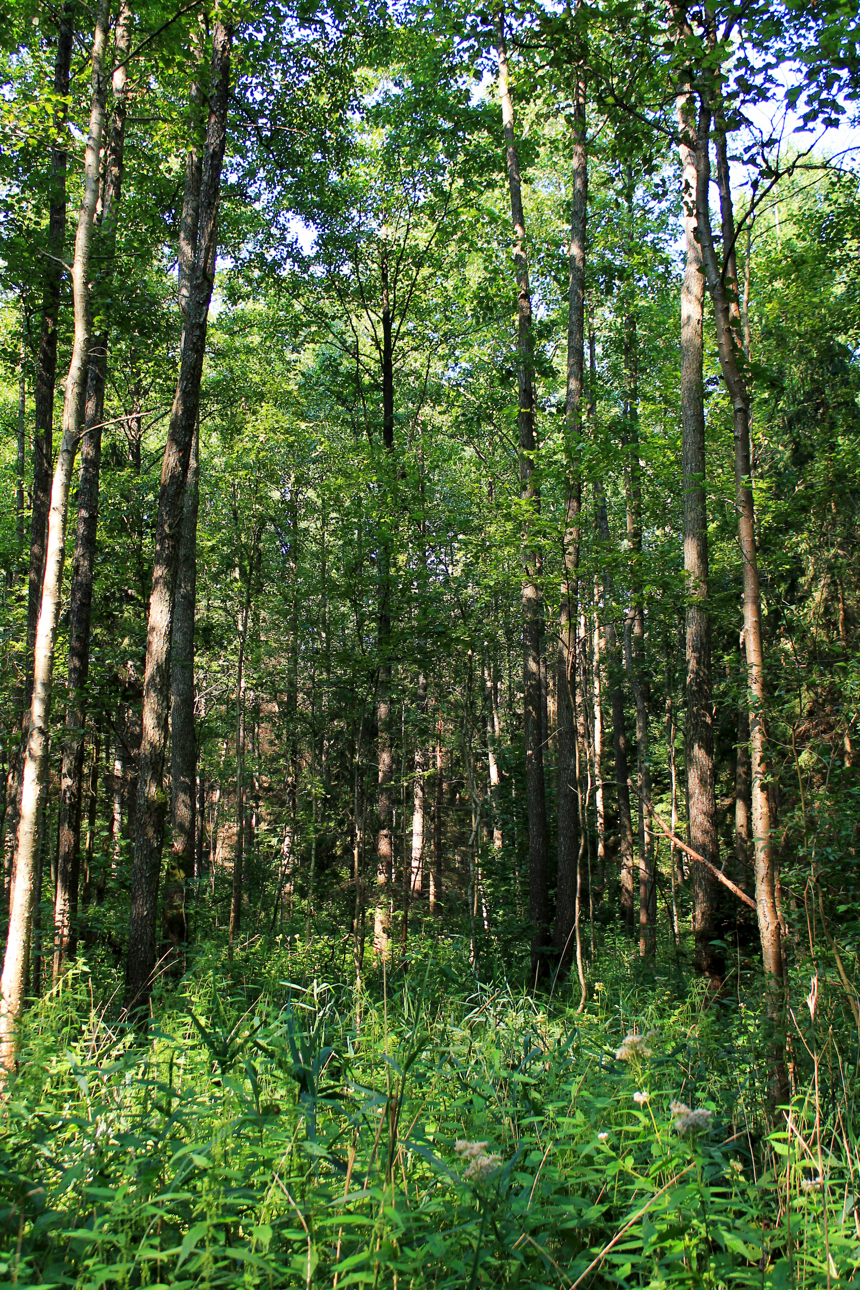 Rezerwat przyrody: Lasy Naturalne Puszczy Białowieskiej This is a photography of protected area with CRFOP ID PL.ZIPOP.1393.RP.1536